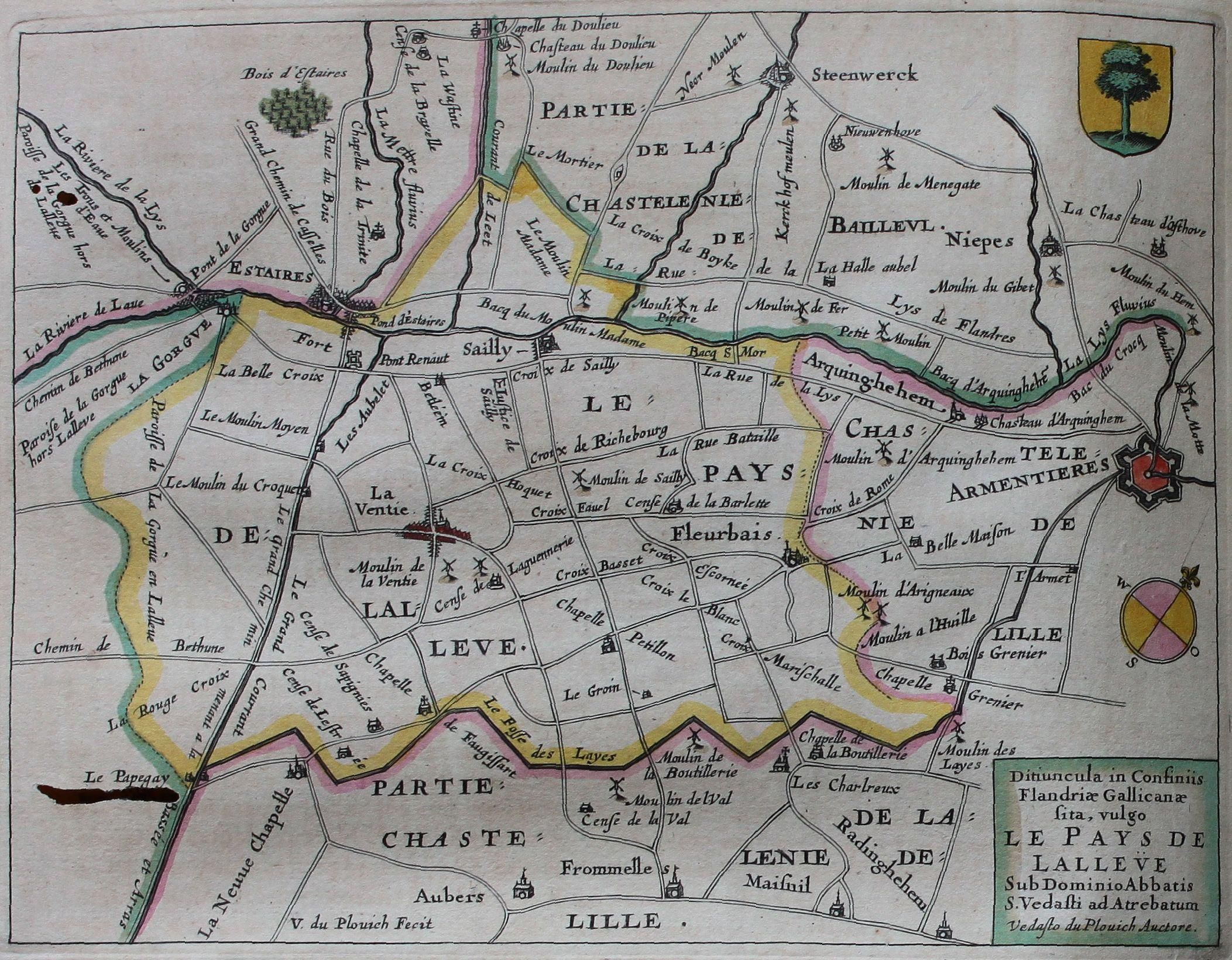 Descripción bibliográfica: Geographia Blaviana. - [Amsterdam : Juan Blaeu, 1659] . - [32], VI, 96 p., 34 f., h. 35a, 35b, 35c, 35d, 36-44 f., 34, [2], 36-40, [2], 43-70 [i. e. 75], [1] f., [20] p. de map., [9] f. de map., [4] f. pleg. de map., [2] f. de plan., [2] f. ge grab. : |bil. ; |cFol. marca major (57 cm.) . - En la dedicatoria a Felipe IV: "Presenta ... El Atlas Universal y Cosmographico de los orbes y terrestre ... Juan Blaeu" . - Título tomado del frontispicio. -- Privilegio fechado en 1659. -Errores de pag. - Sign.: 1, *2, **3, ***-****2, a-e2, A-I2, K1, L-Z2, Aa-Dd2, 4 2, Ee-Ff2, A-I2, K1, L2, M1, N-Y2, Z5, Aa-Dd2, Ee1, A-D2, E-F1, G-I2, K-L1, M-O2, P1, Q-Z2, Aa-Bb2, Cc1, Dd3, Ff-Zz2, Aaa-Bbb2, . - Frontispicio grab. col. -- Incluye un total de 49 il. entre map., plan. i grab. Materia: Atlas - Obras anteriores a 1800 Impresor: Blaeu, Joan, 1596-1673, imp. Lugar de impresión: Holanda. Amsterdam Localización: Vea la ilustración en su contexto Visite también la exposición "Cartografía histórica en la Biblioteca de la Universidad de Sevilla"